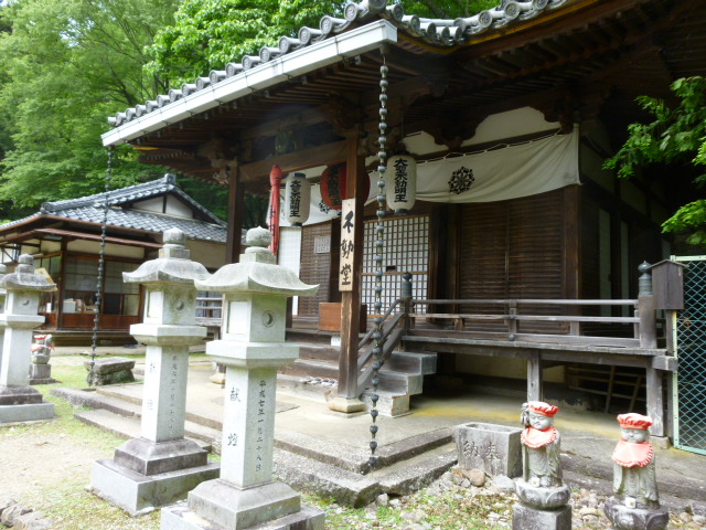 東大寺不動堂